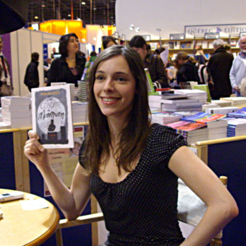 Lolita Séchan au salon du livre de Paris, 2007.